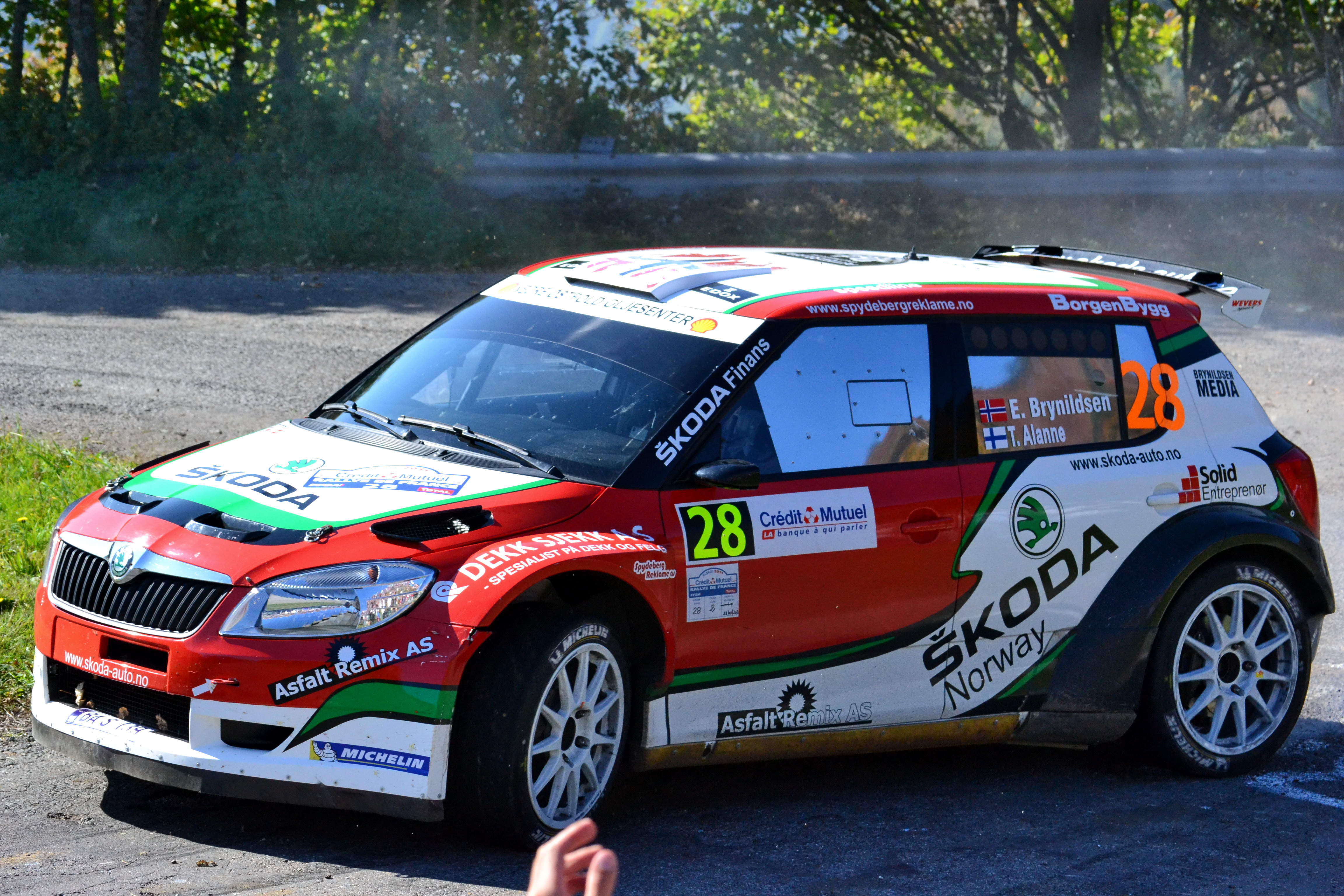 Rallye WRC France 2011, ES12 Grand Ballon. Škoda Fabia S2000 - Eyvind Brynildsen/T. Alanne